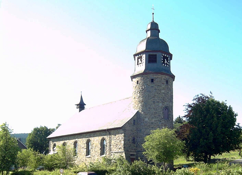 Die St. Michael Kirche in Holthausen (Schmallenberg), Germany.